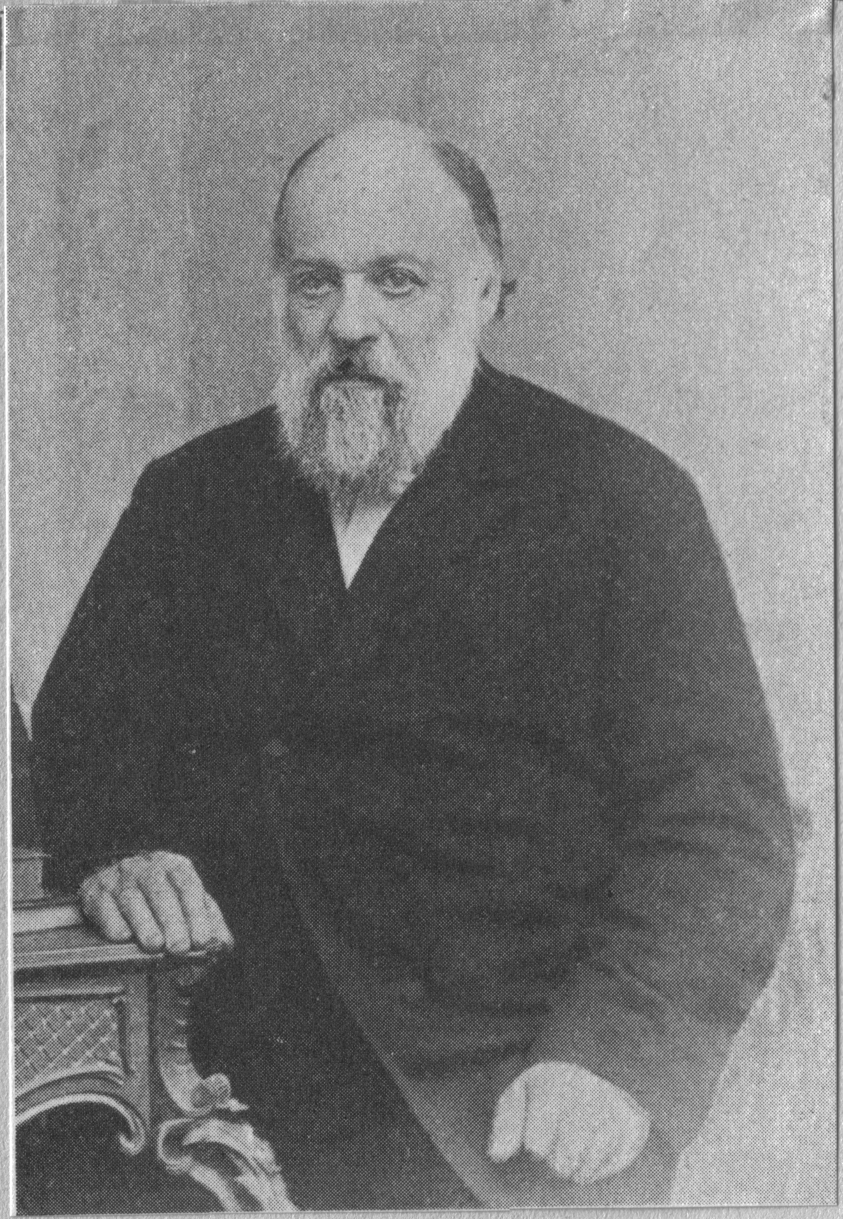 Norsk (bokmål): Den norske historikeren Ludvig Ludvigsen Daae.